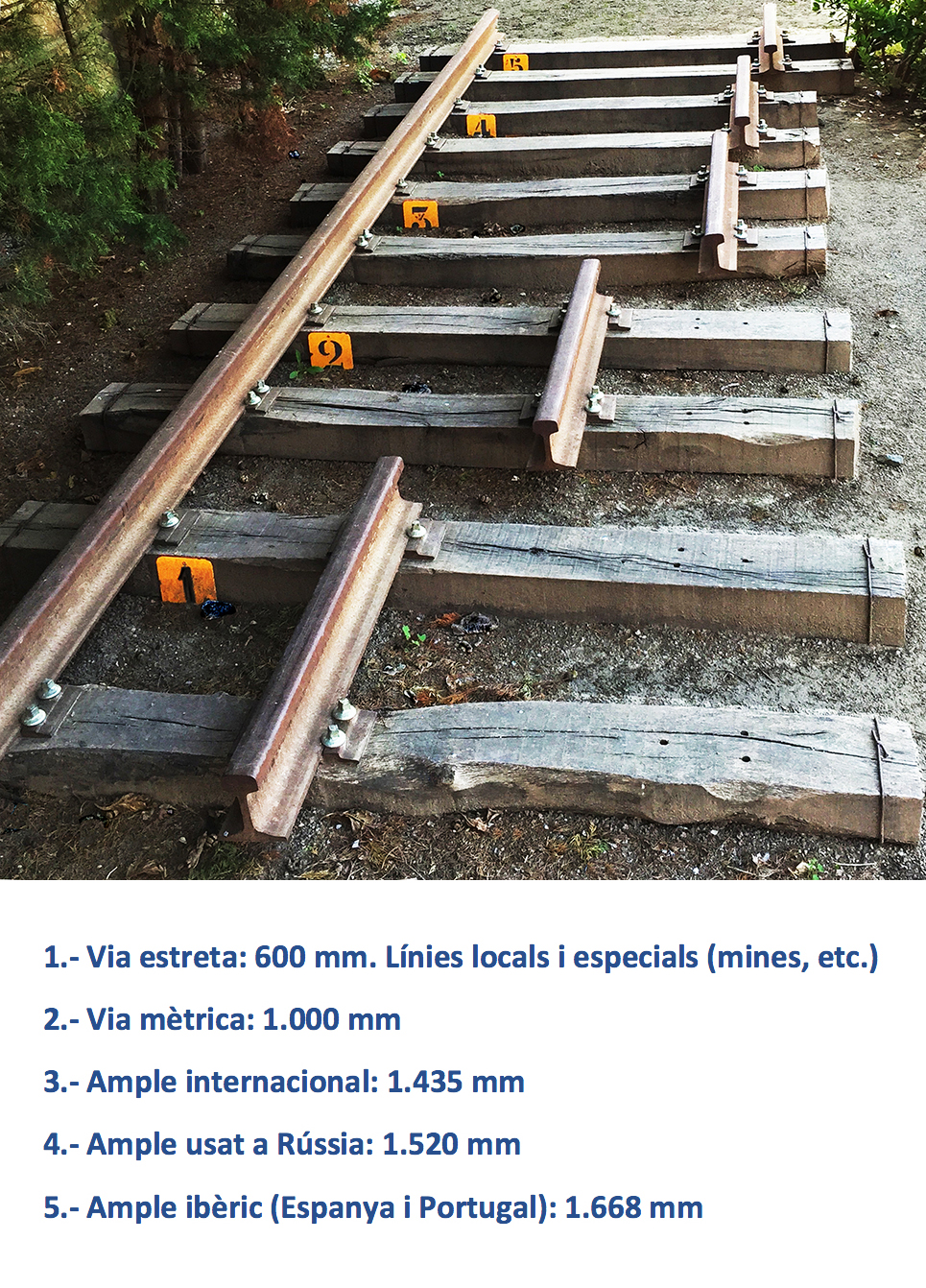 Amples ferroviaris usuals fins 1998